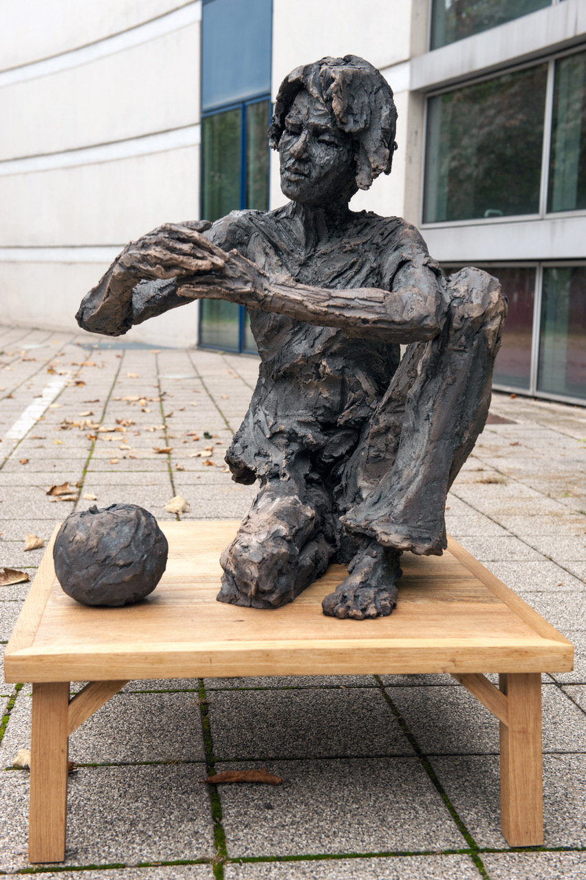 2014 h 100 cm propriété de l'artiste